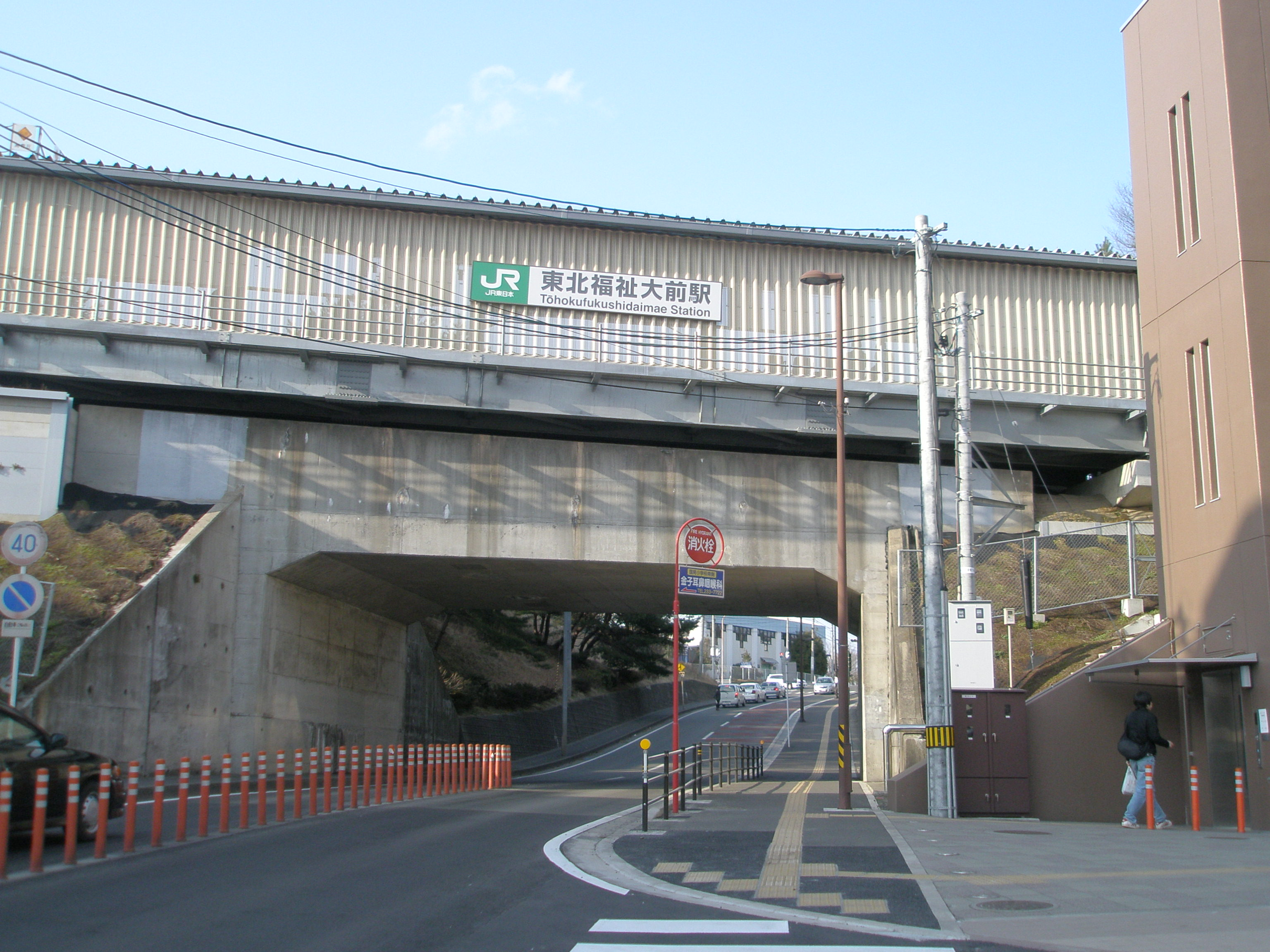 東北福祉大前駅、下の市道から